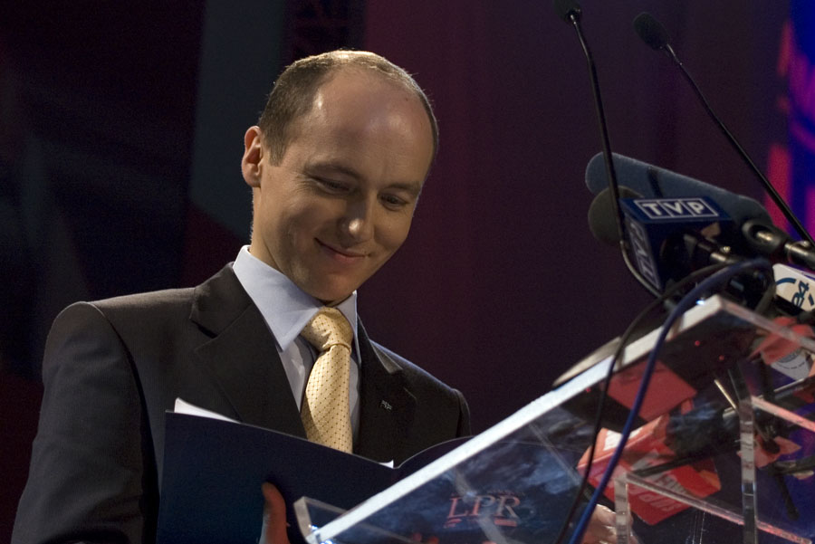 Wojciech Popiela, Konwent wyborczy Ligi Prawicy Rzeczypospolitej, 15 września 2007 r.